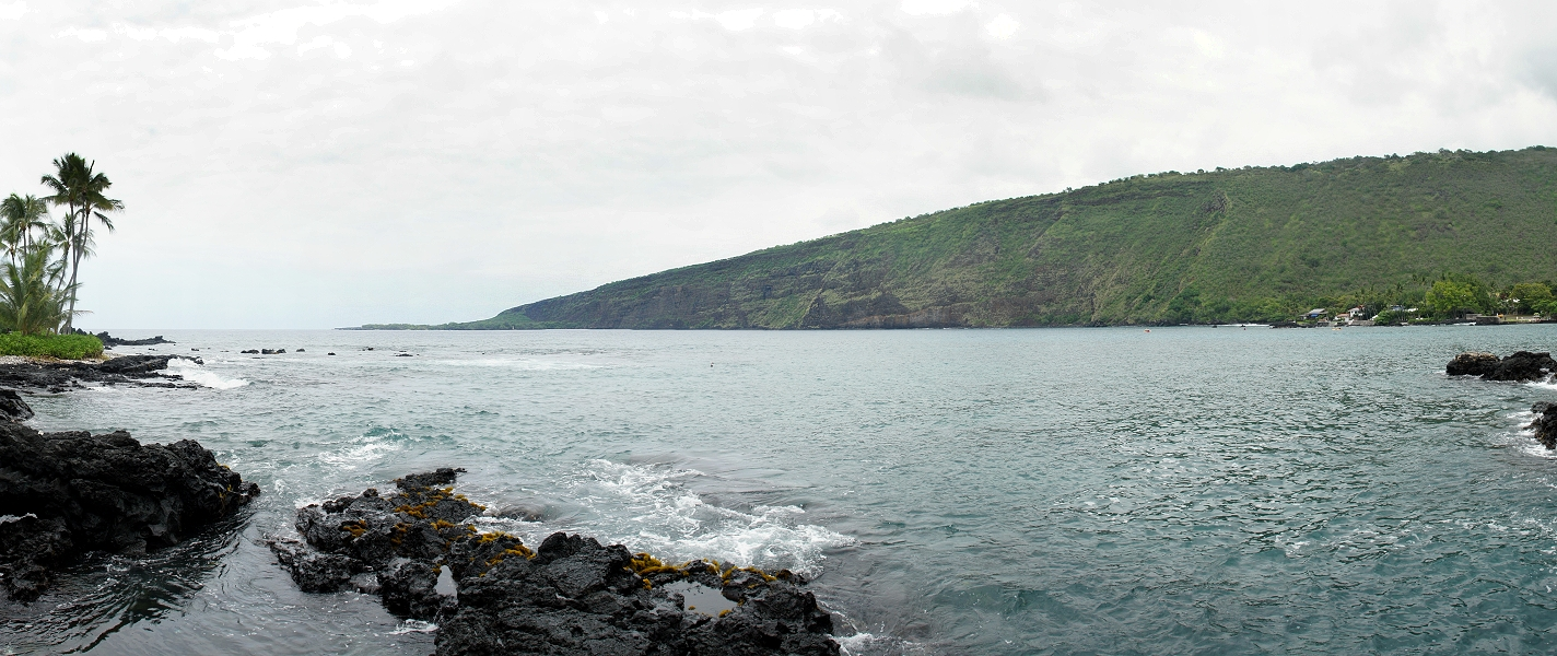 Иллюстрация для викиучебника Гавайеведение